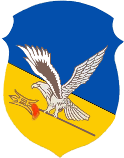 中華民國空軍警衛 初期部隊徽